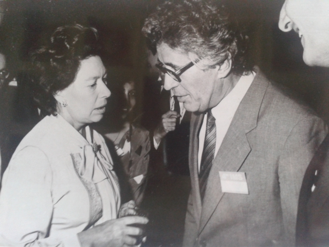 Federigo Sicuteri e la Regina Elisabetta II